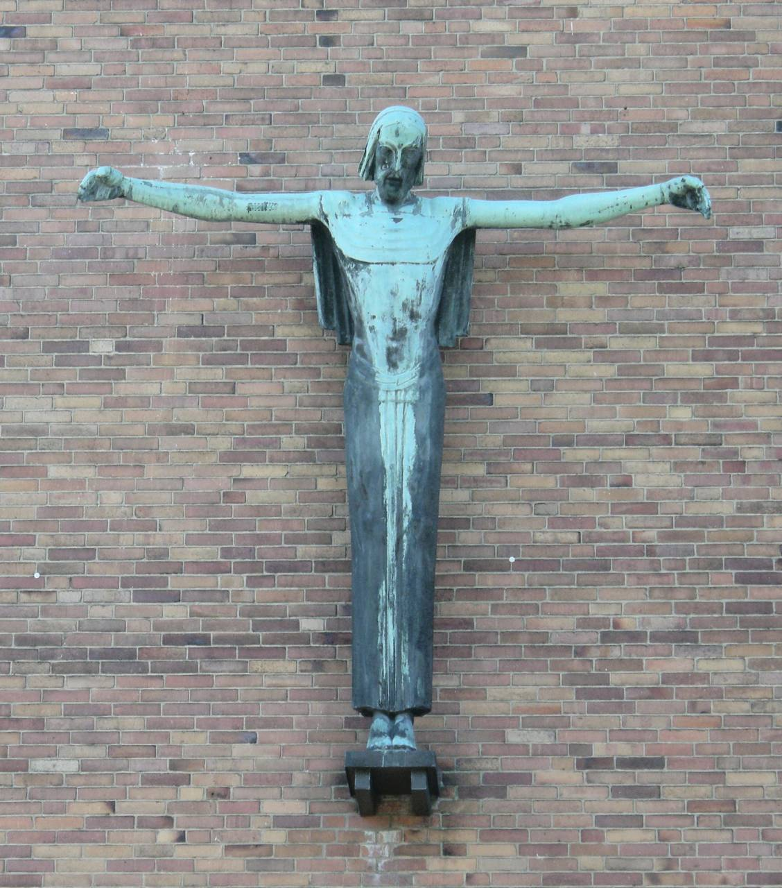 Ludwig Isenbeck: Christus segnet die Gemeinde. Bronze, um 1930. Hittorfstraße 23 (Ecke Faradayweg), Berlin-Dahlem.